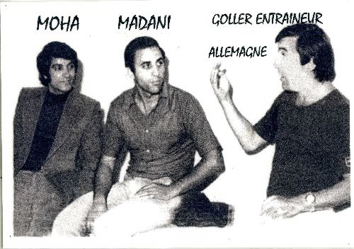 Gottlieb Goller en bon entraîneur , discutant avant le match ,avec l'ancien 'International Mohamed MADANI ( assassiné dans les années 90 ) sous l'oeil intéressé du défunt Moha.